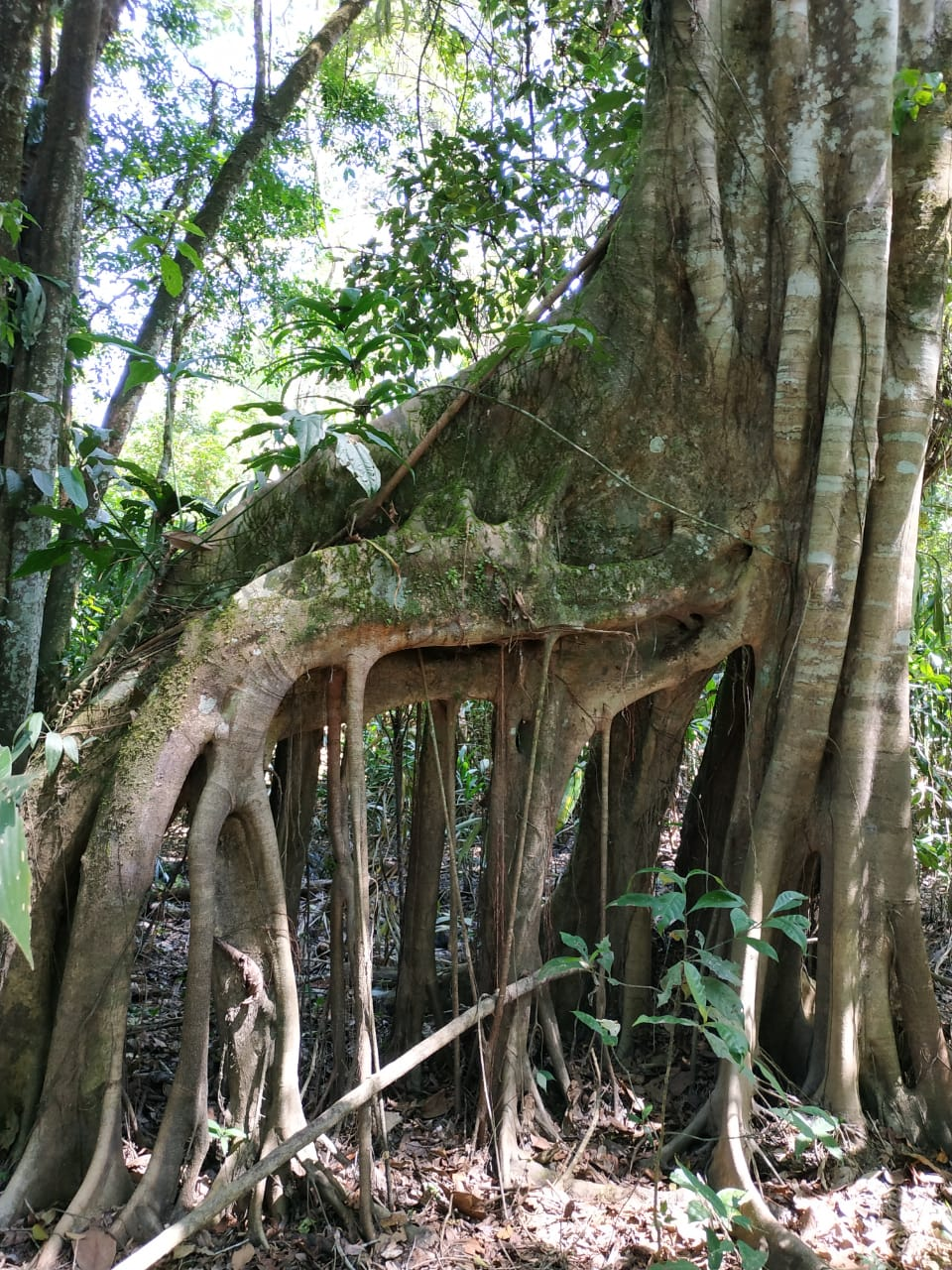 Arbol Amazónico de la zona de inundación en cercanías a la Madrevieja